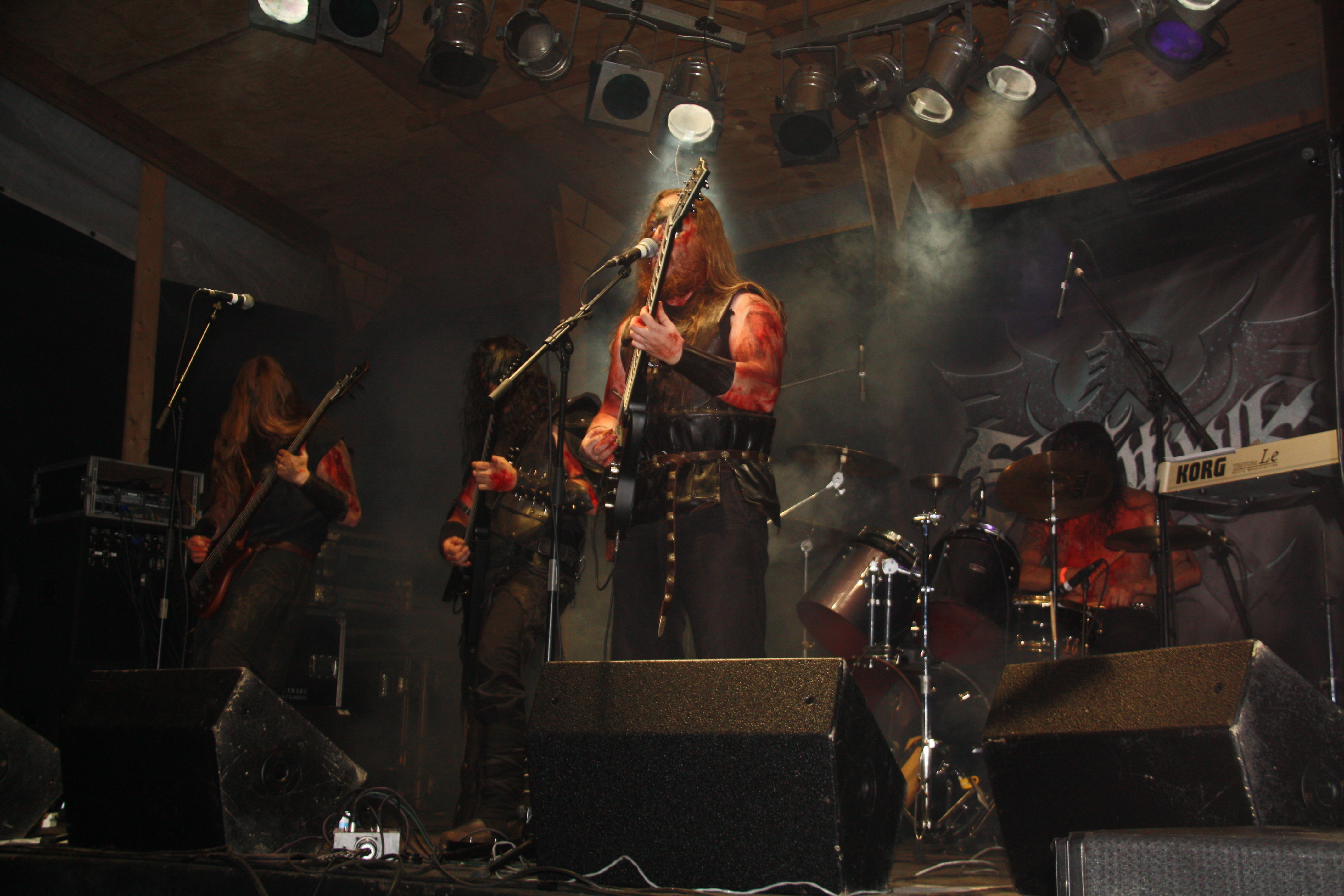 Slechtvalk tijdens Occultfest 2010, zaterdag 4 september